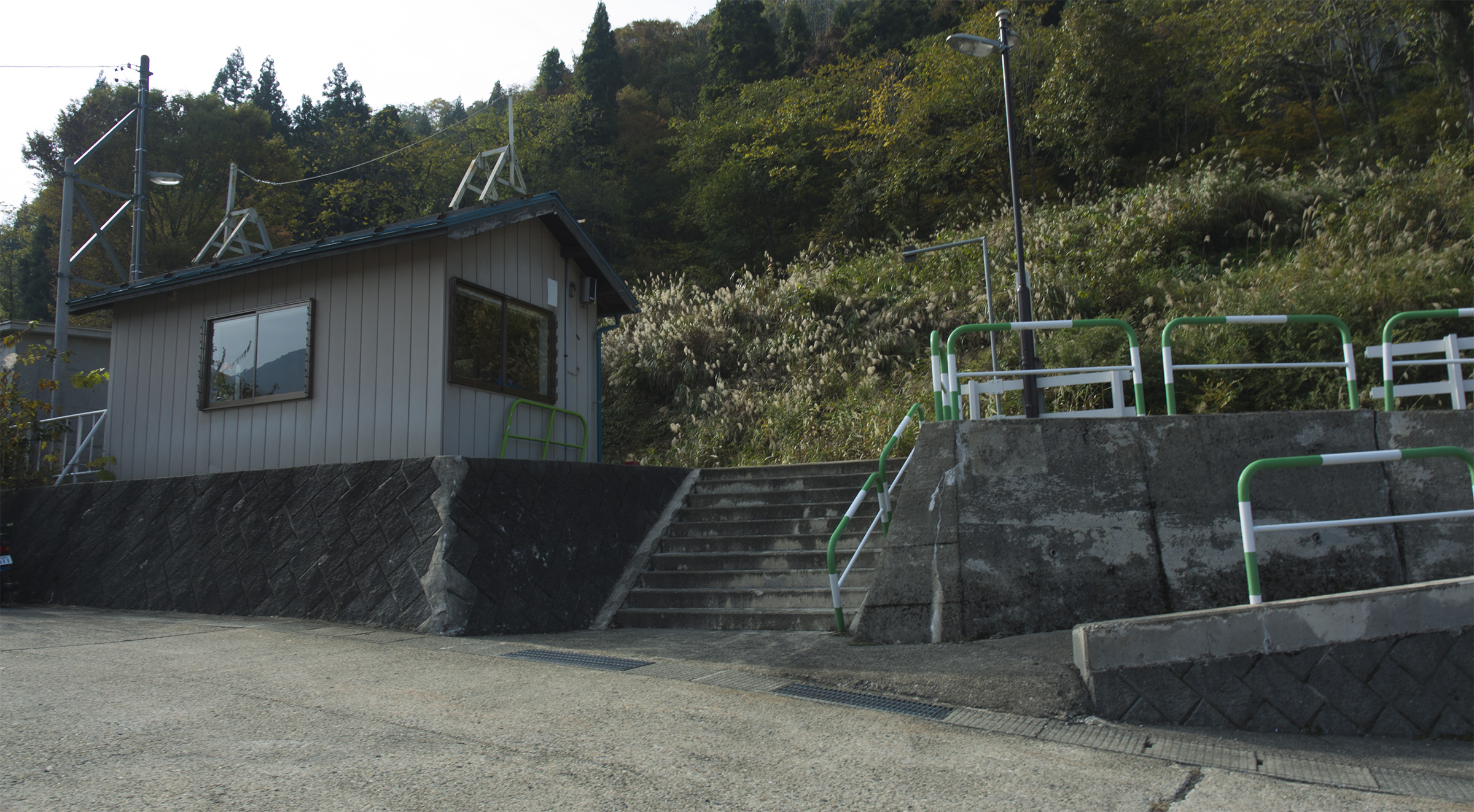 東日本旅客鉄道株式会社飯山線上桑名川駅